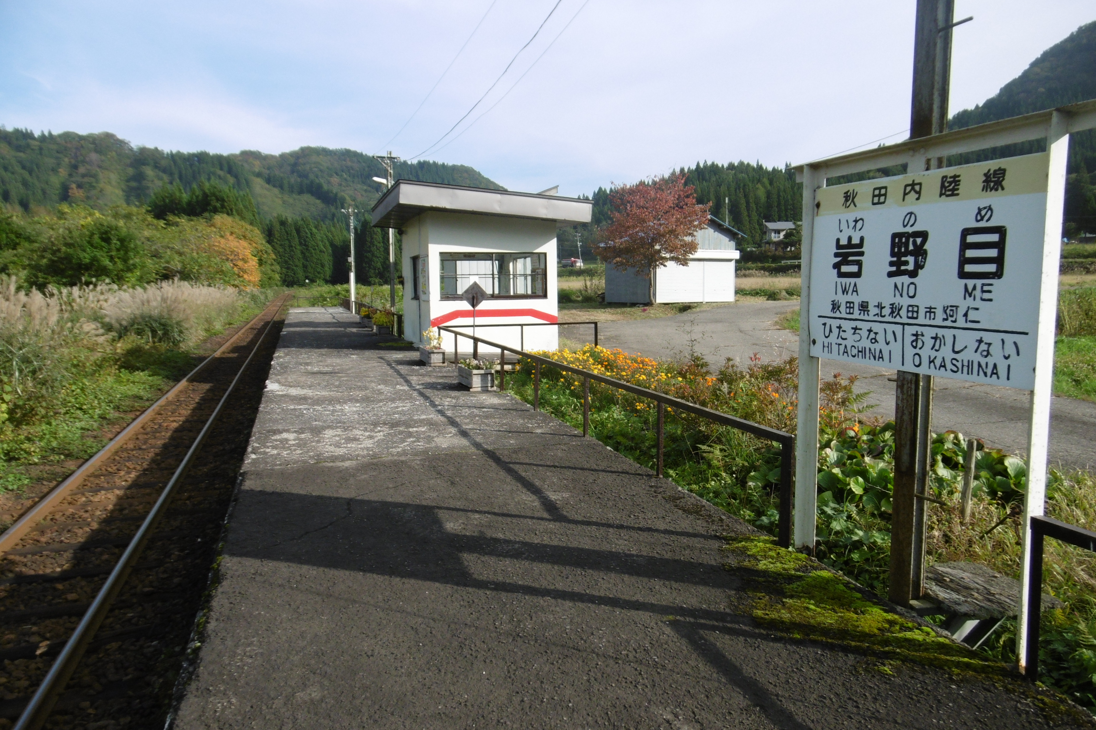 秋田内陸線 岩野目駅